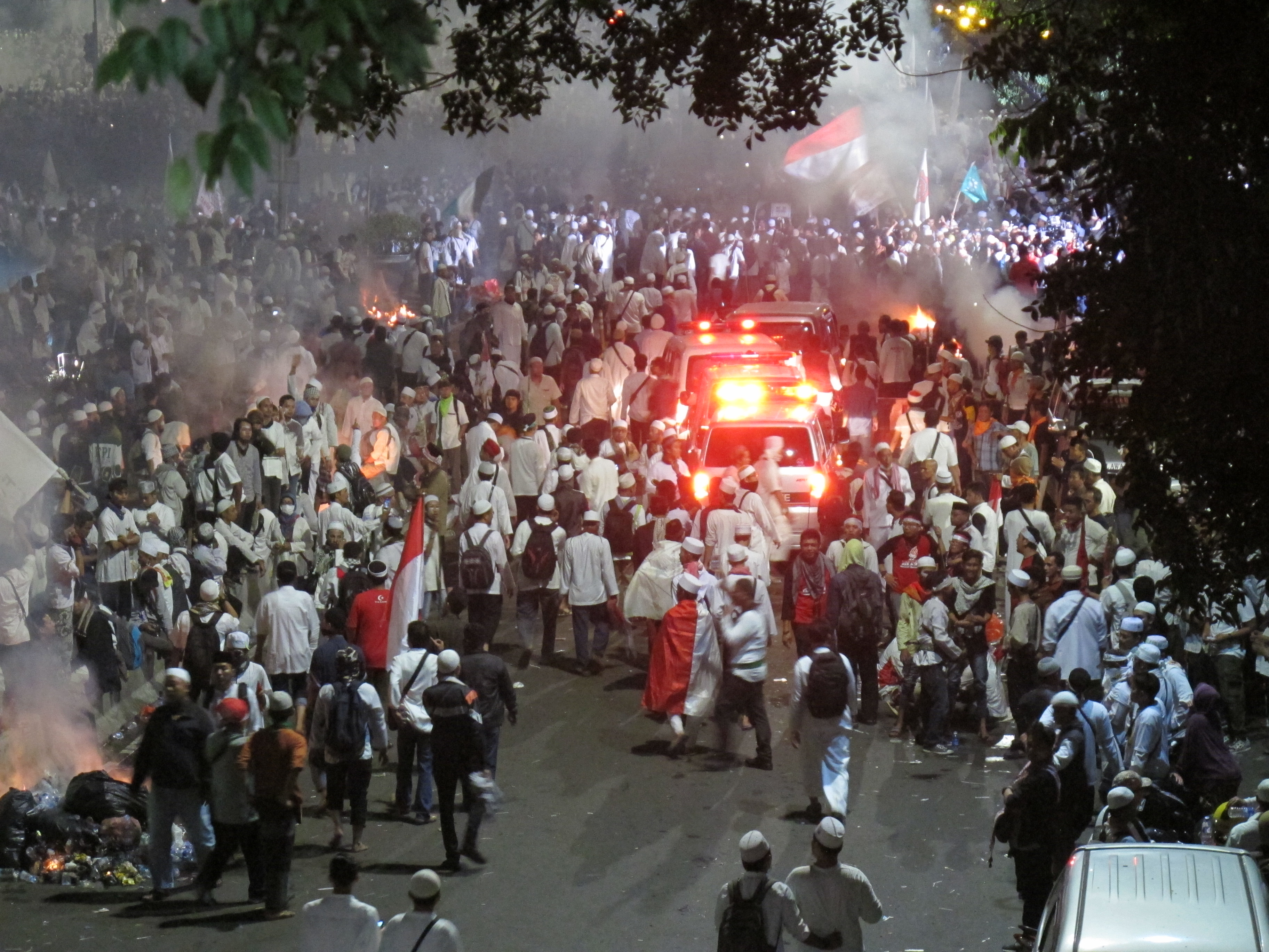 Foto dari Aksi 4 November